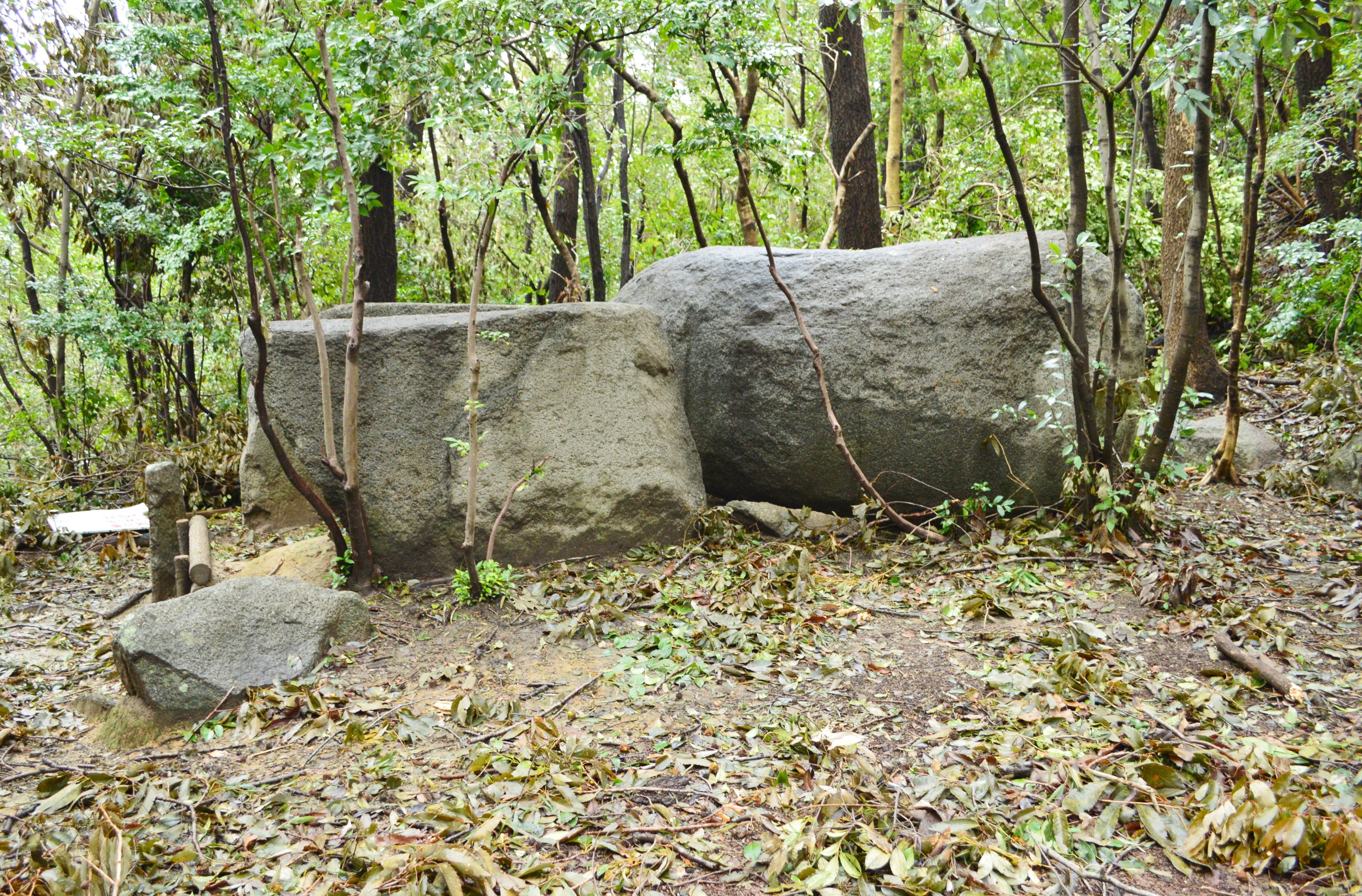 石宝殿古墳 全景 (東方より)